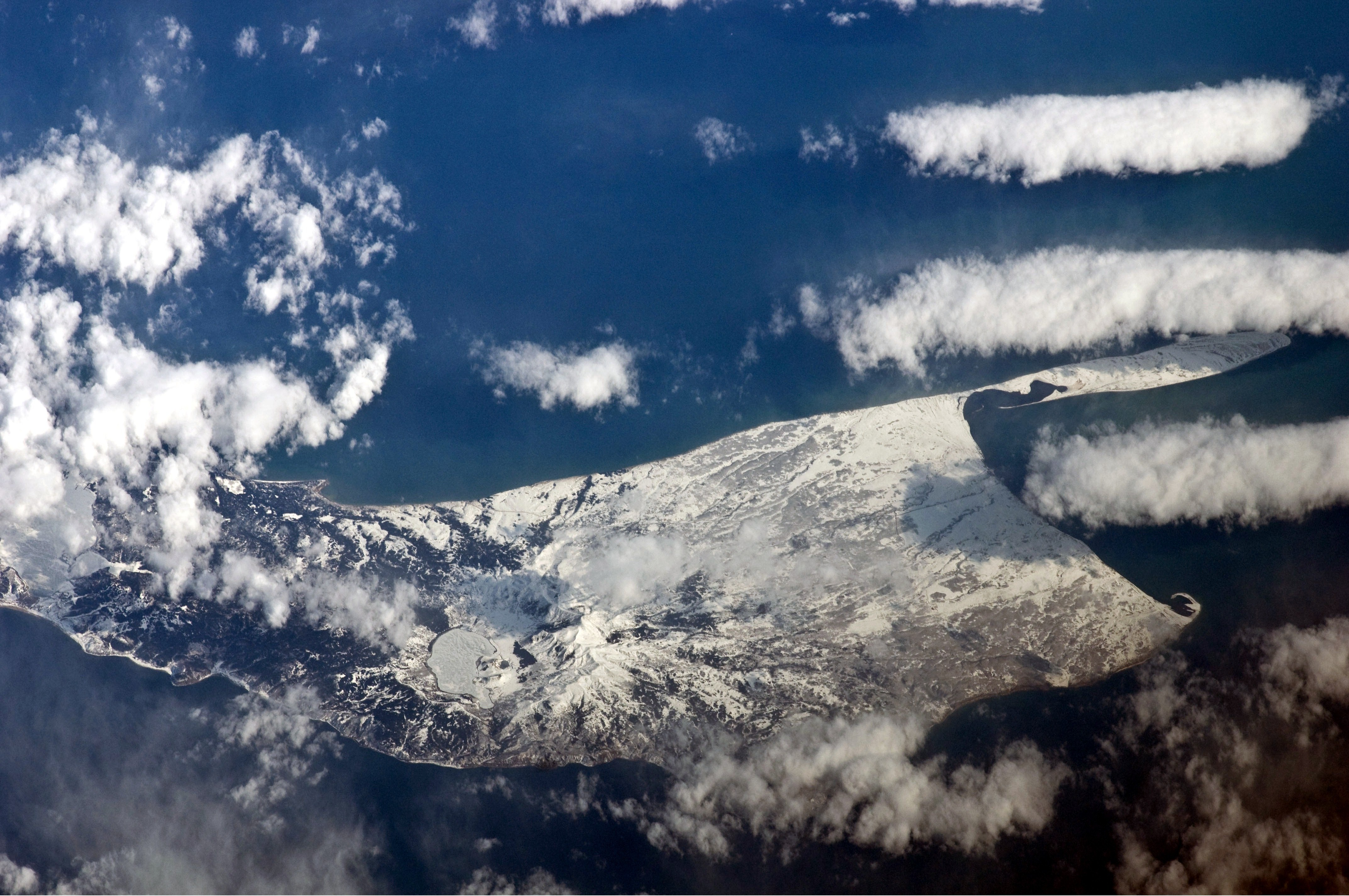 Вулкан Головнина. Снимок с МКС. Фрагмент